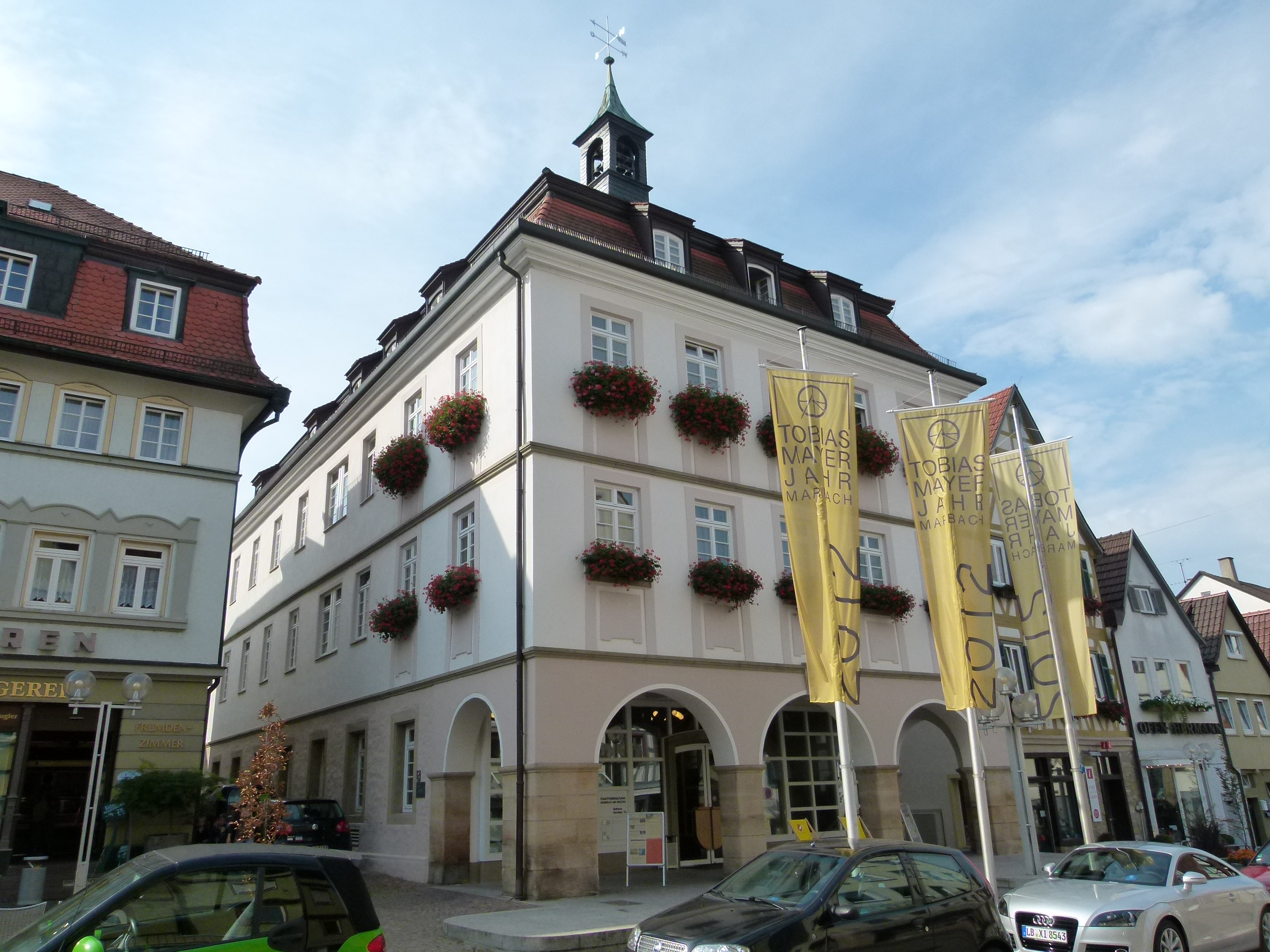 Denkmalgeschütztes Rathaus, Marktstraße 23, Marbach am Neckar